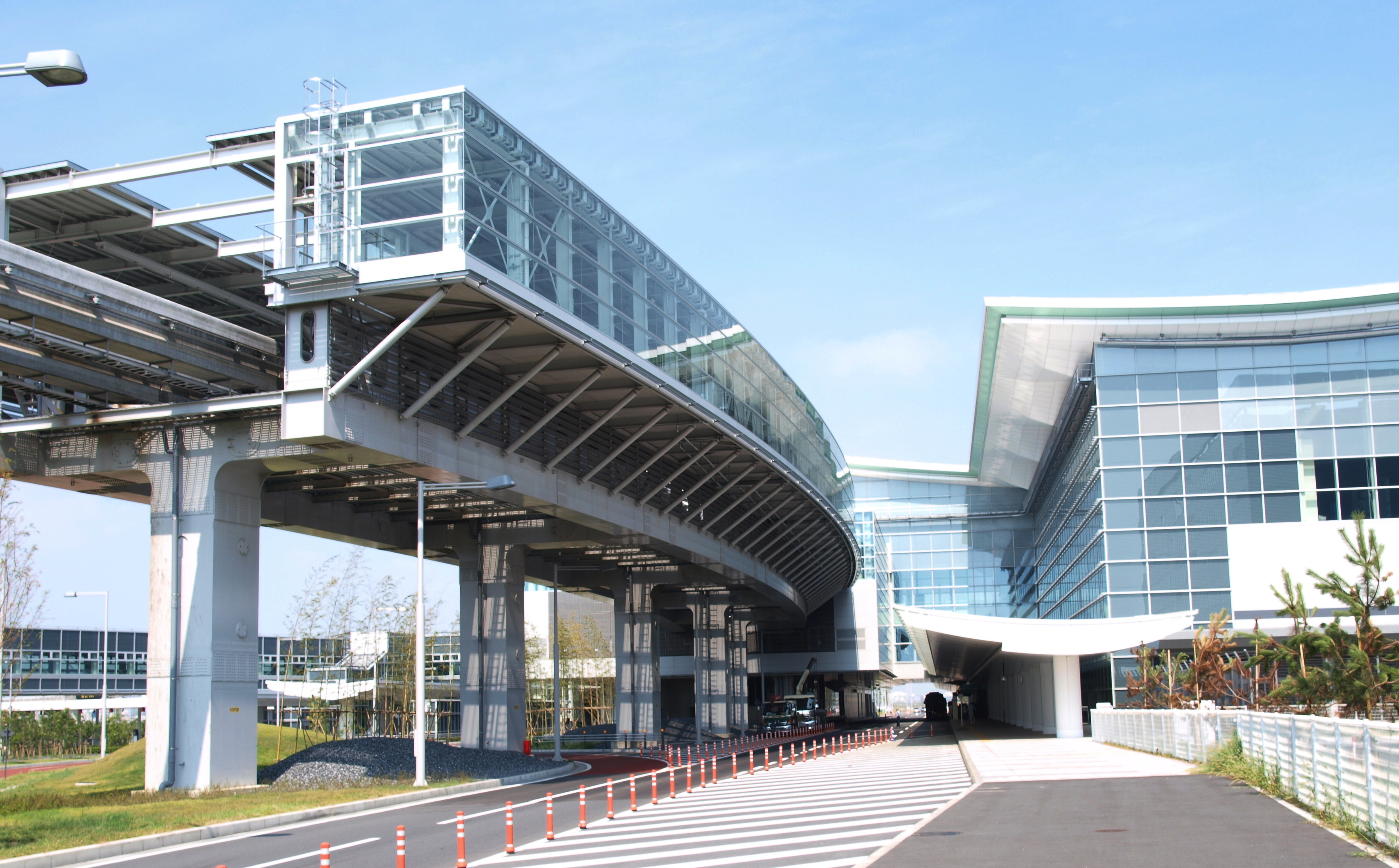 東京モノレール 羽田空港国際線ビル駅ホーム（羽田空港第1ビル駅方より天空橋方を見上げる）